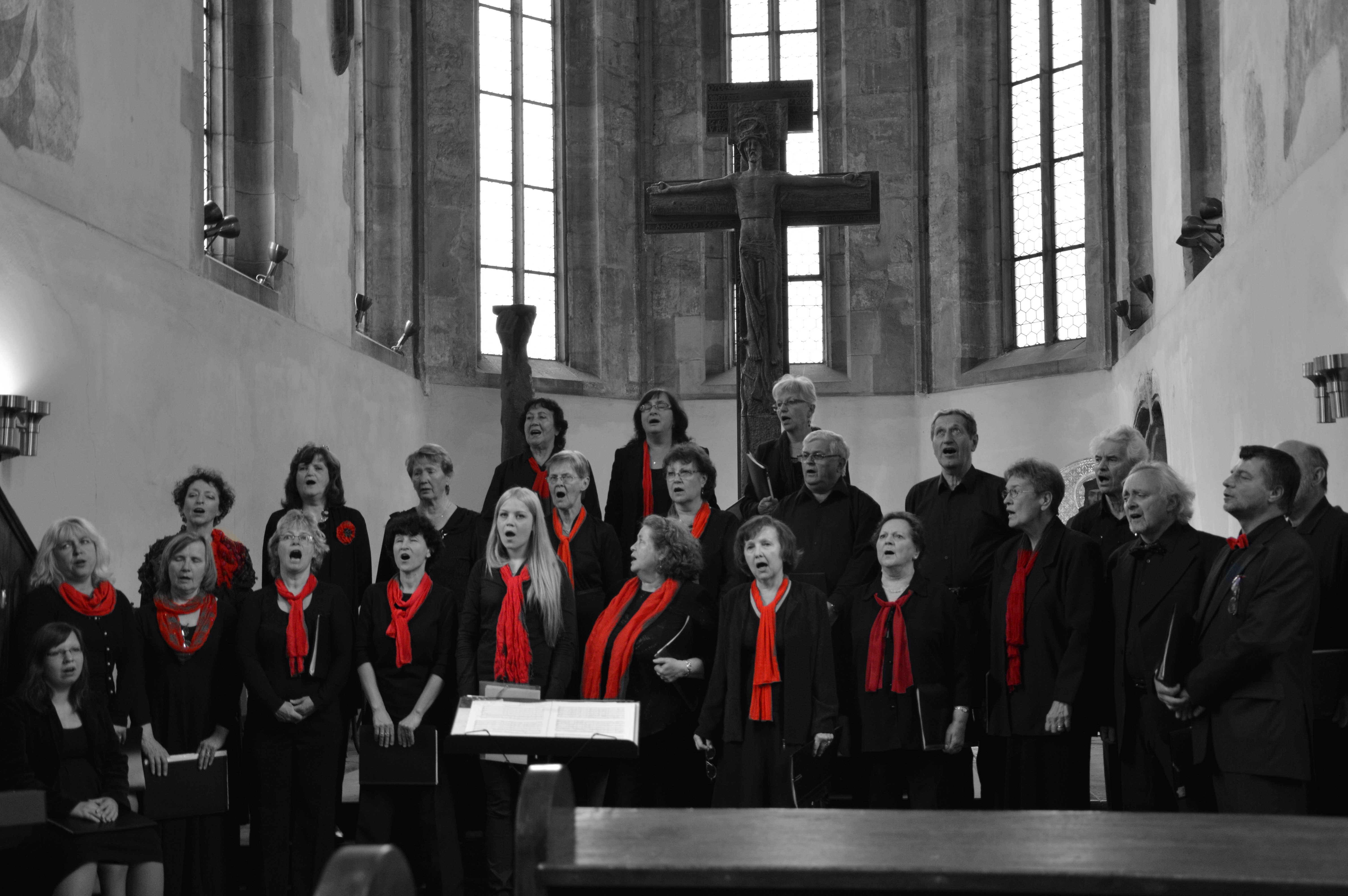 Smíšený sbor Josefa Vycpálka